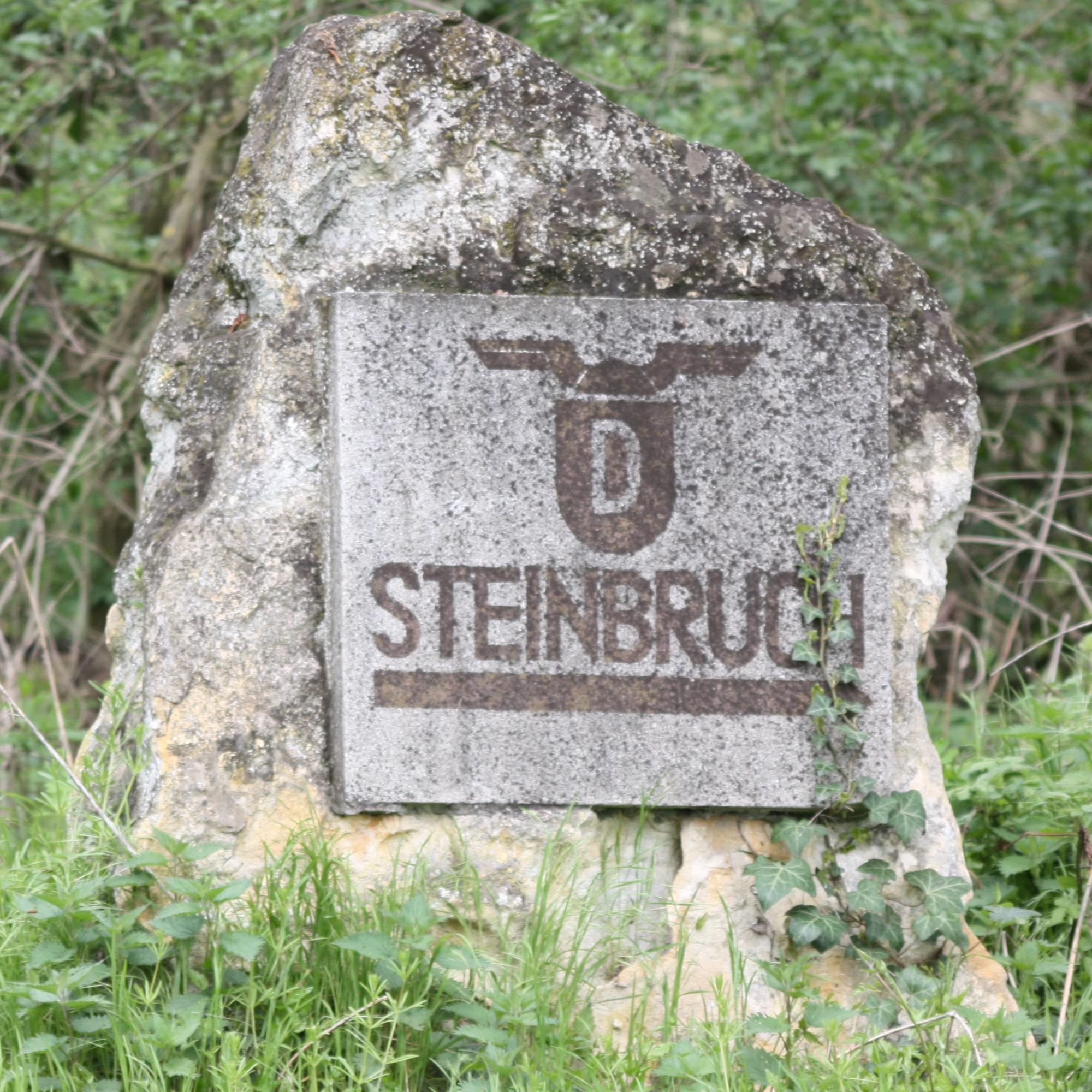 Hinweisstein auf den Steinbruch der Dykerhoff AG bei Mainz-Amöneburg (Wiesbaden, Hessen, Deutschland)